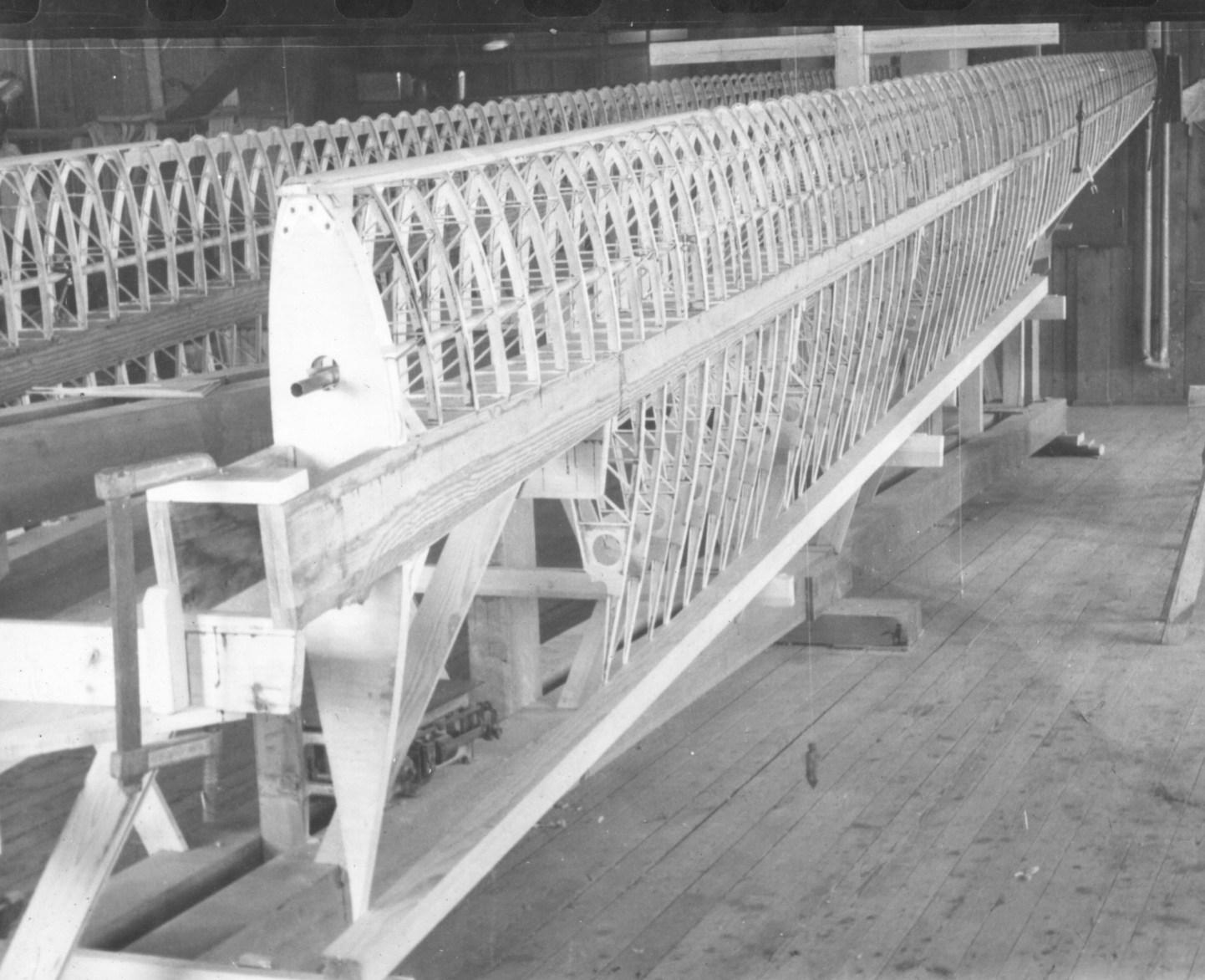 Die in holzbauweise gfertigten Flächen der Akaflieg München Mü 22a mit einem besonders geringen Rippenabstand von nur 110mm.